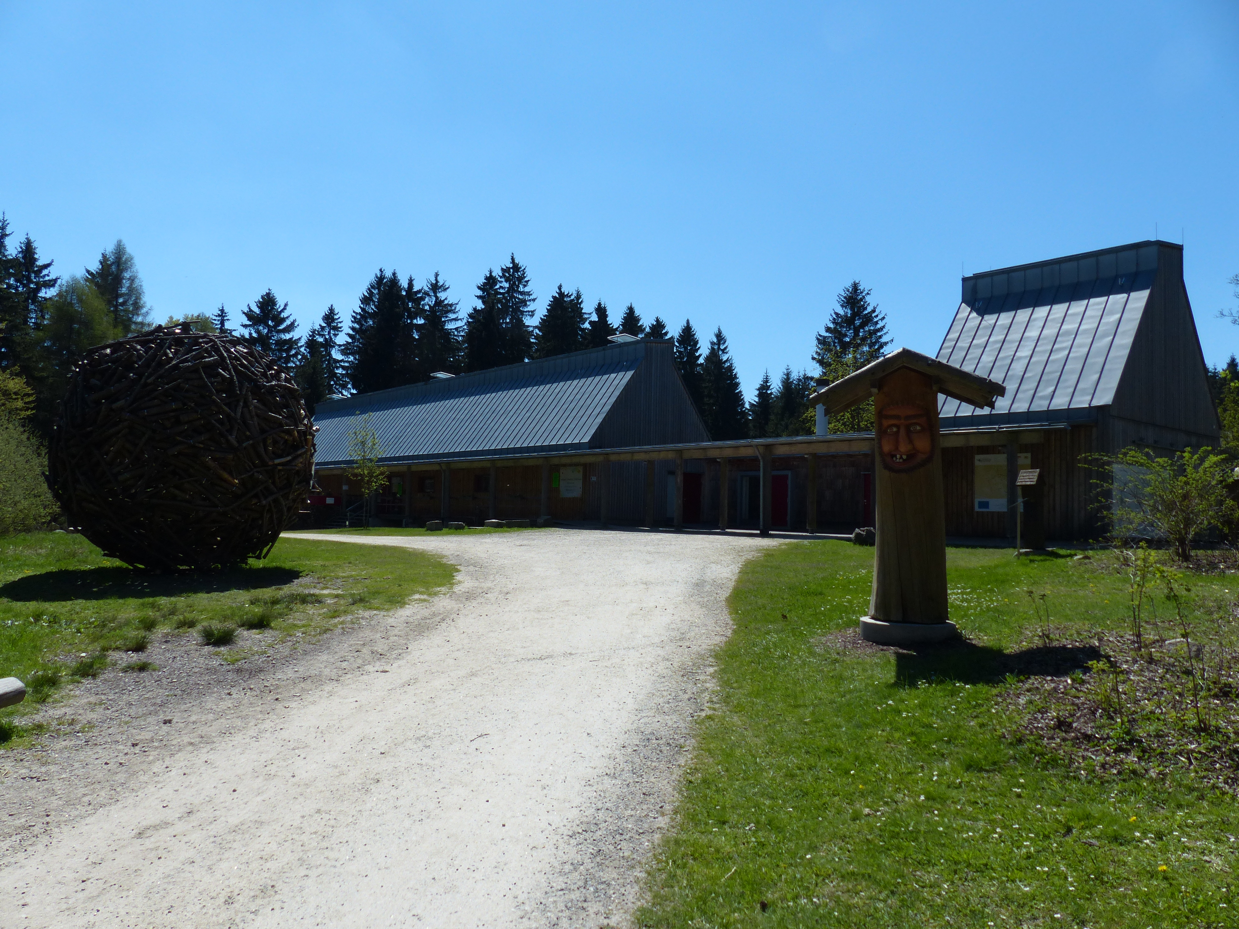 Wildpark Waldhaus Mehlmeisel: Eingang zum Park, Infozentrum